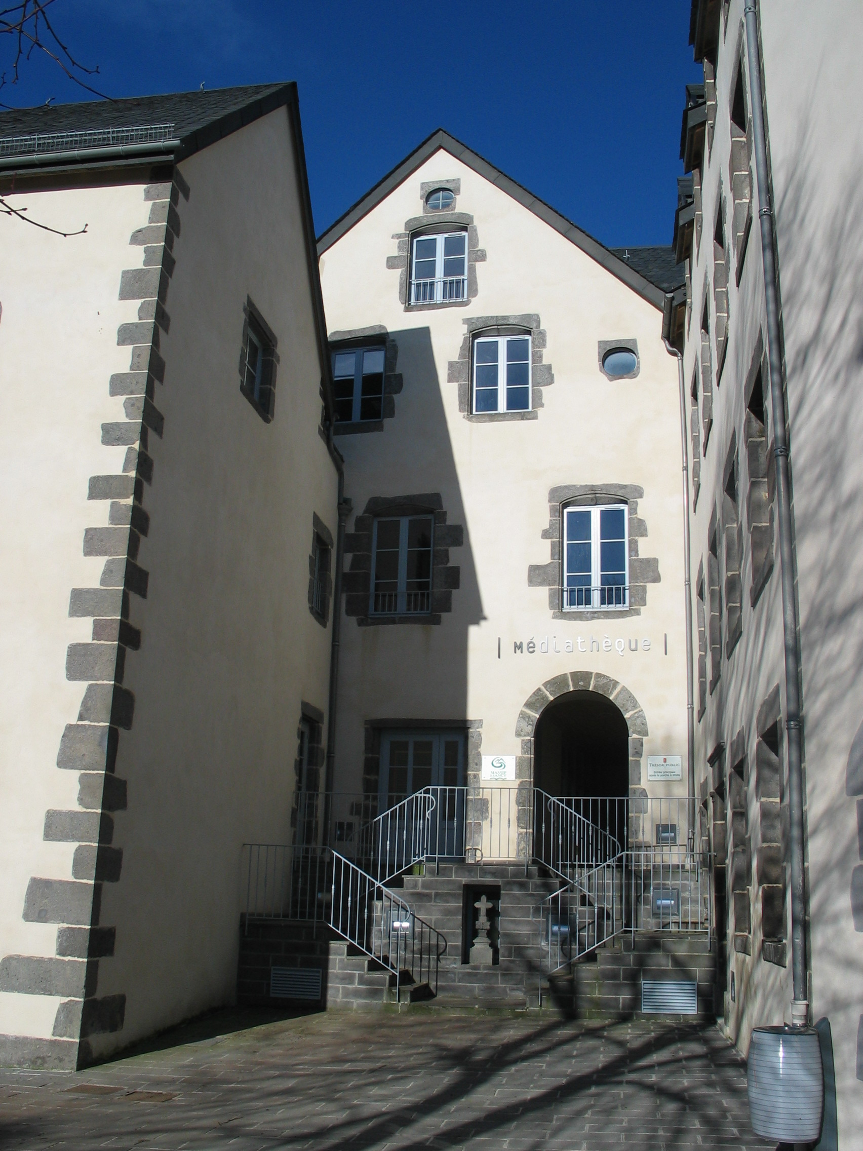 Façade de la médiathèque de Besse en Chandesse